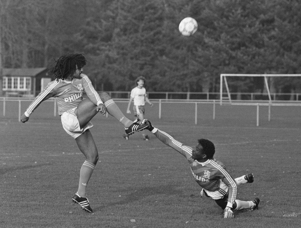 Oefenwedstrijd Nederlands Elftal tegen Jong Oranje in verband met Europese Kampioenschappen Kwalificatie; jong Oranje doelman Menzo grijpt voet van Gullit.